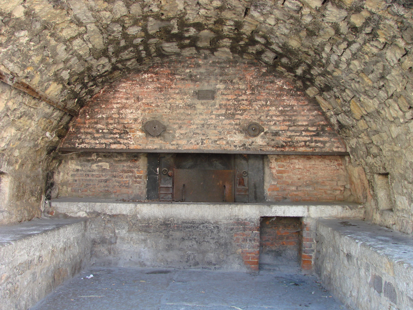 Le four de Serrières (canton de Saint-Rambert-en-Bugey)